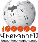 2013 թ. դեկտեմբերի 2 - Հայերեն Վիքիպեդիան անցավ 100000 հոդված ցուցանիշը։